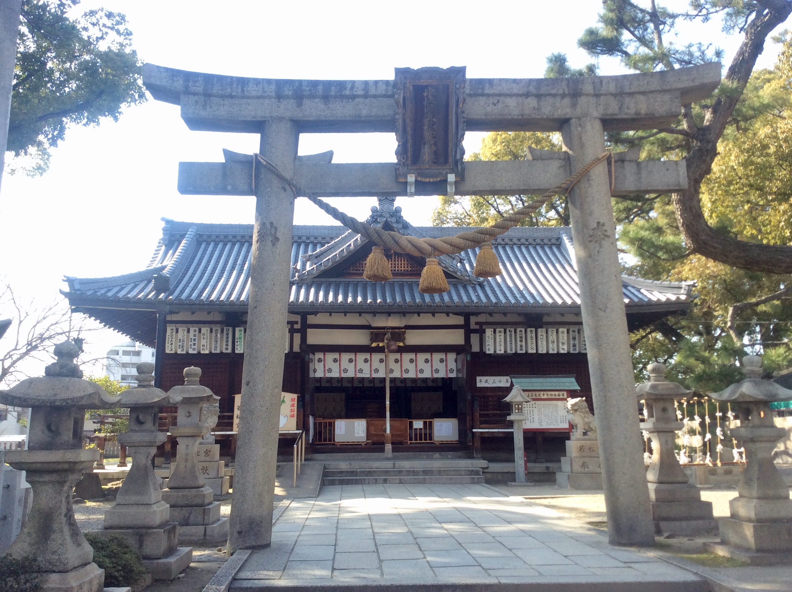 止止呂支比売命神社